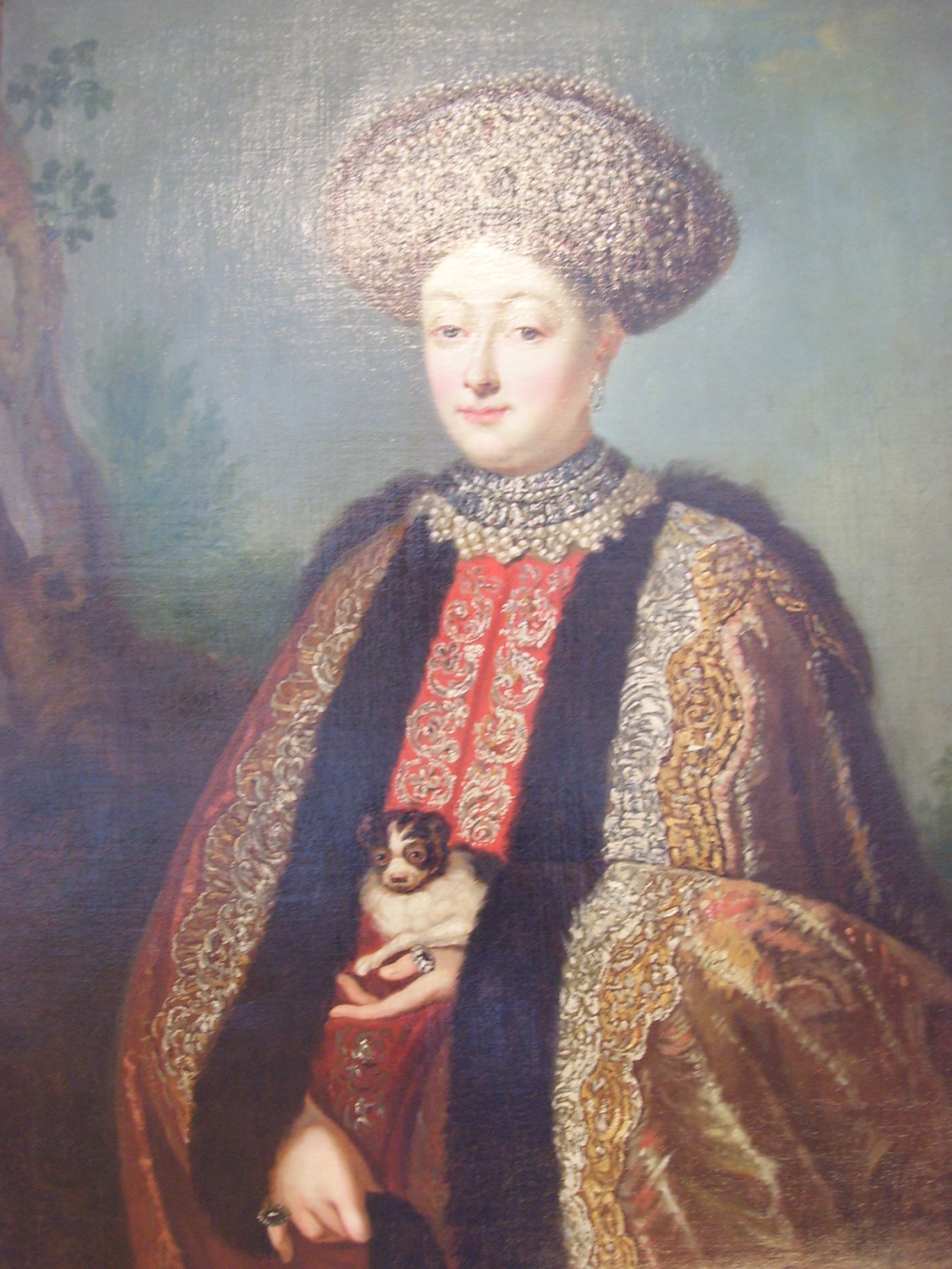 Marfa Apraxina Неизвестный художник Портрет царицы Марфы Матвеевны, урожд. Апраксиной (1664 – 1715), второй жены царя Федора Алексеевича Холст, масло ГМЗ "Гатчина"